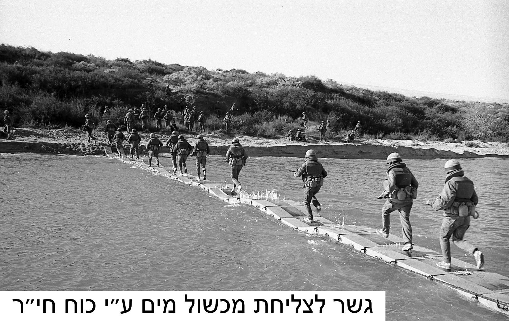 גשר חי"ר. התמונה צולמה כאשר סיימנו את הפיתוח של הגשר, ובצענו ניסוי אגמ"י בהשתתפות חיילים לוחמים.